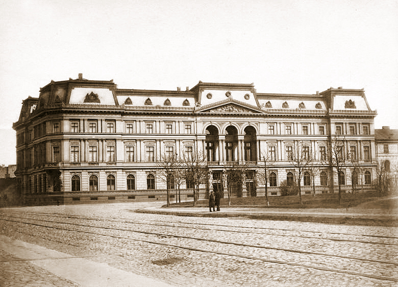 Pałac Kronenberga krótko po ukończeniu budowy